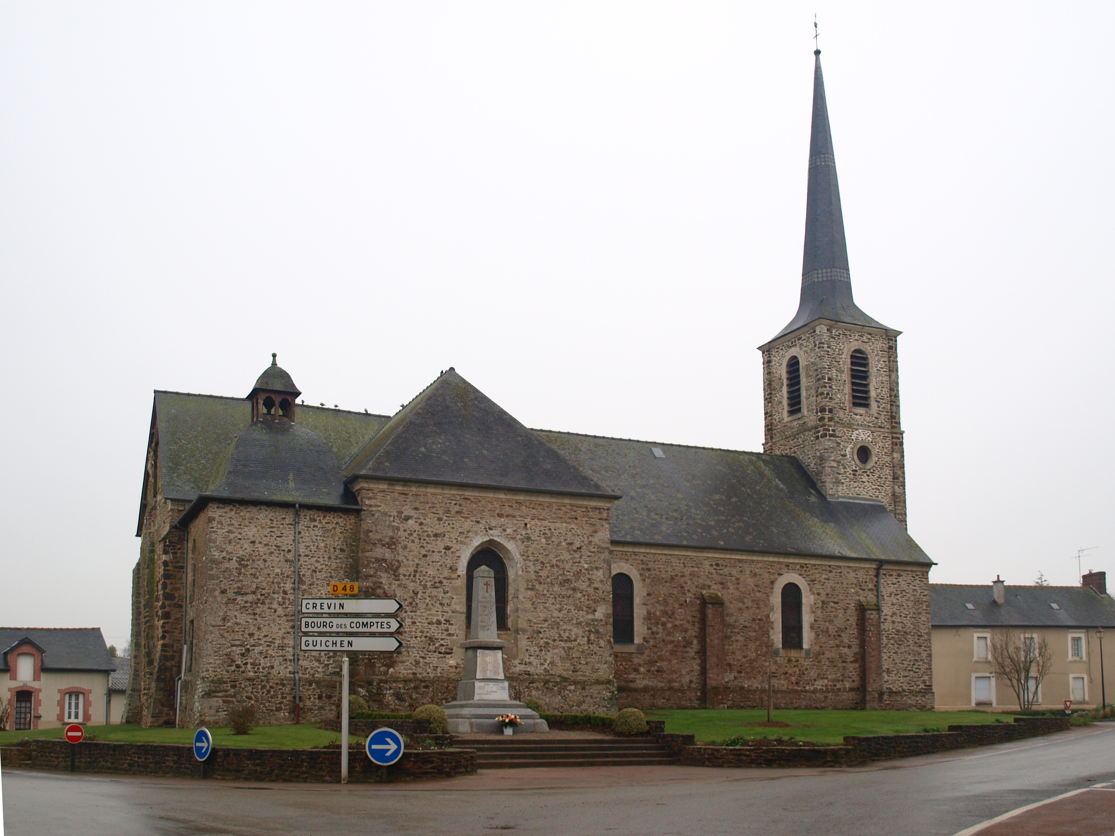 Brie (Ille-et-Vilaine, France) ; église